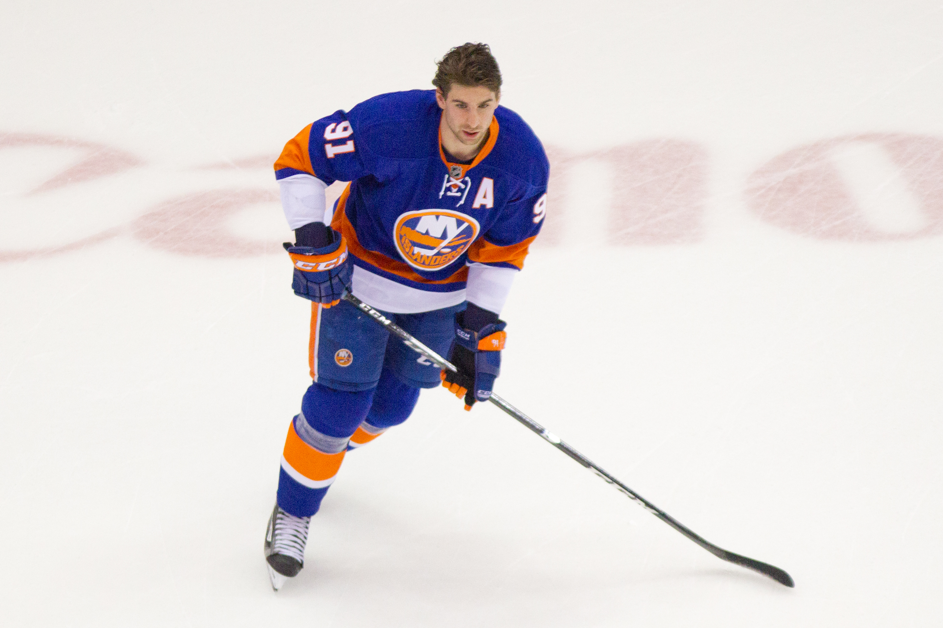 John Tavares vs Raiders